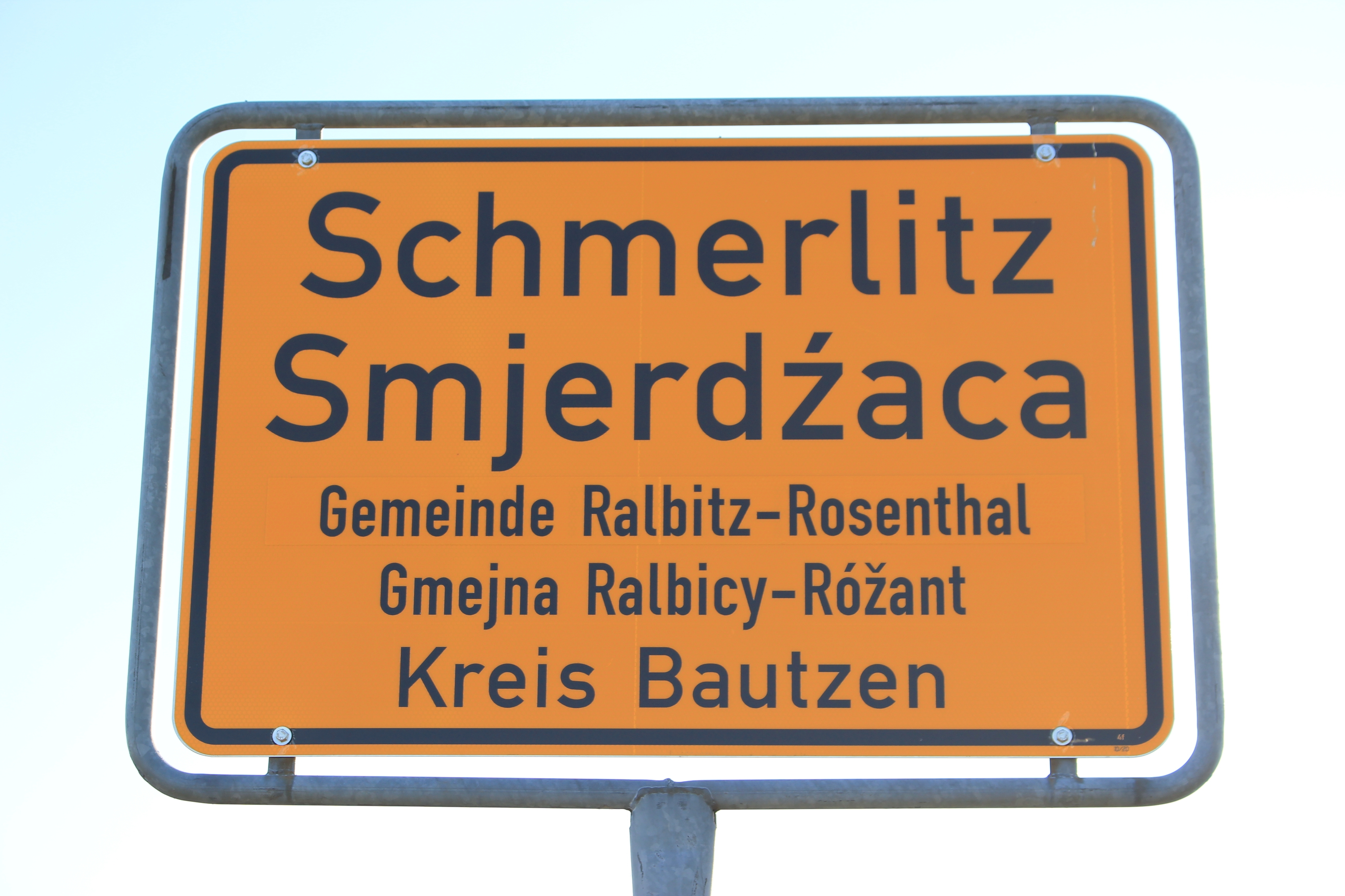 Hornjoserbsce: Dwurěčna wjesna tafla w Smjerdźacej